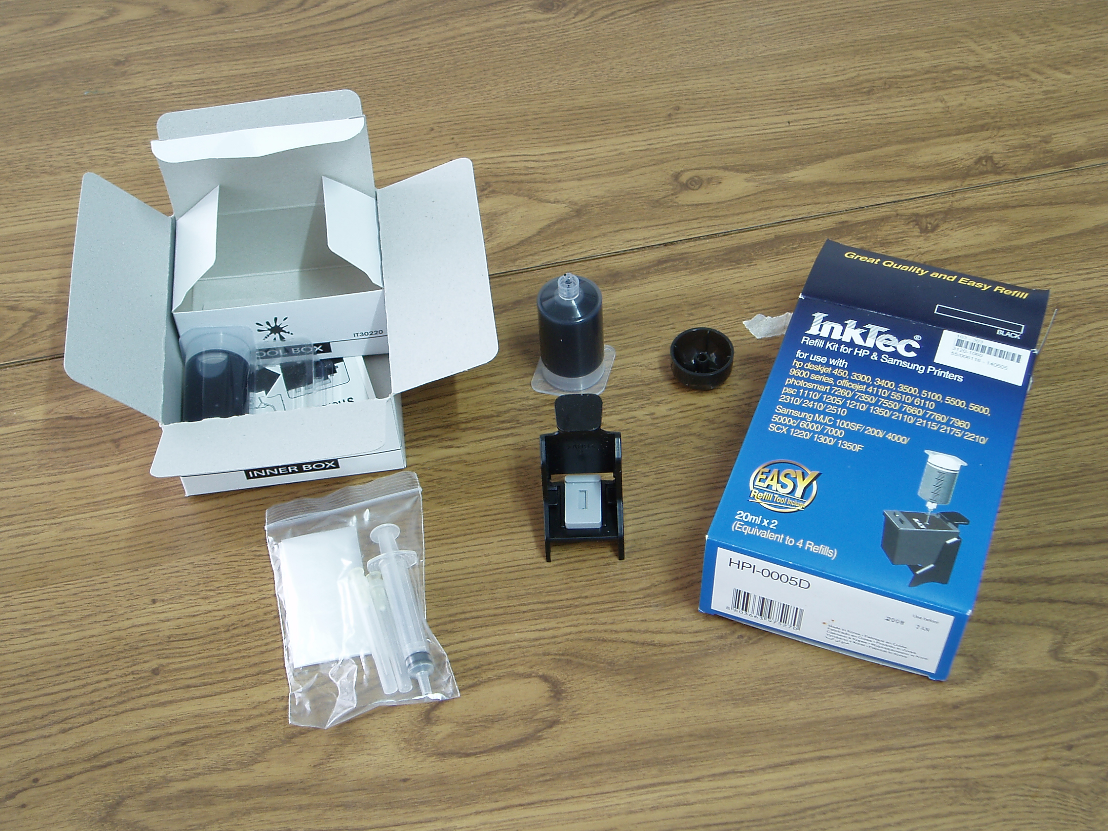 "Kit de rellenado de tinta Negro."